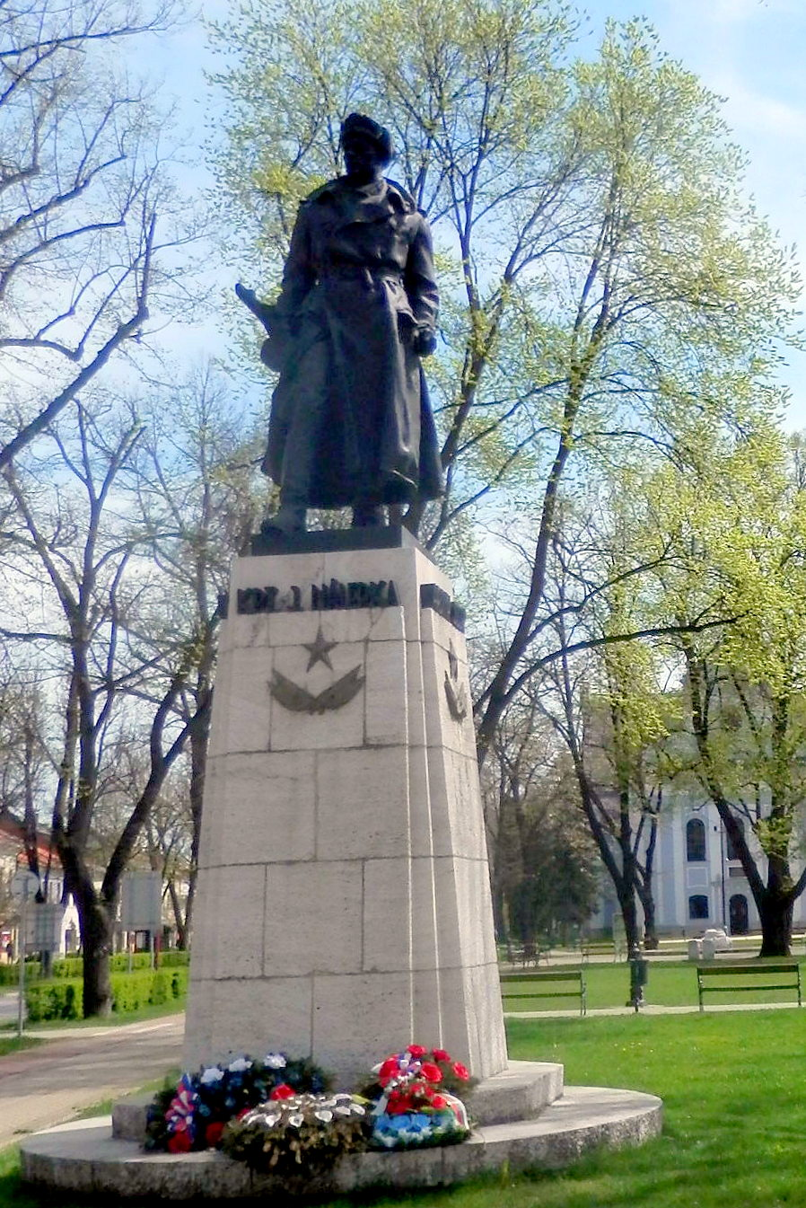 V parku na Radničnom námestí stojí pamätník kapitána Jána Nálepku. Doba vzniku 8.5.1954. Mesto Spišská Nová Ves.